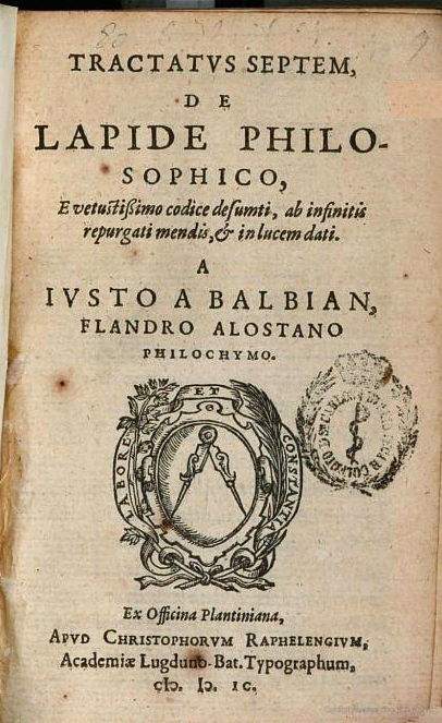 Titelblad van "Tractaus Septum" door Joost Balbian (1543-1616